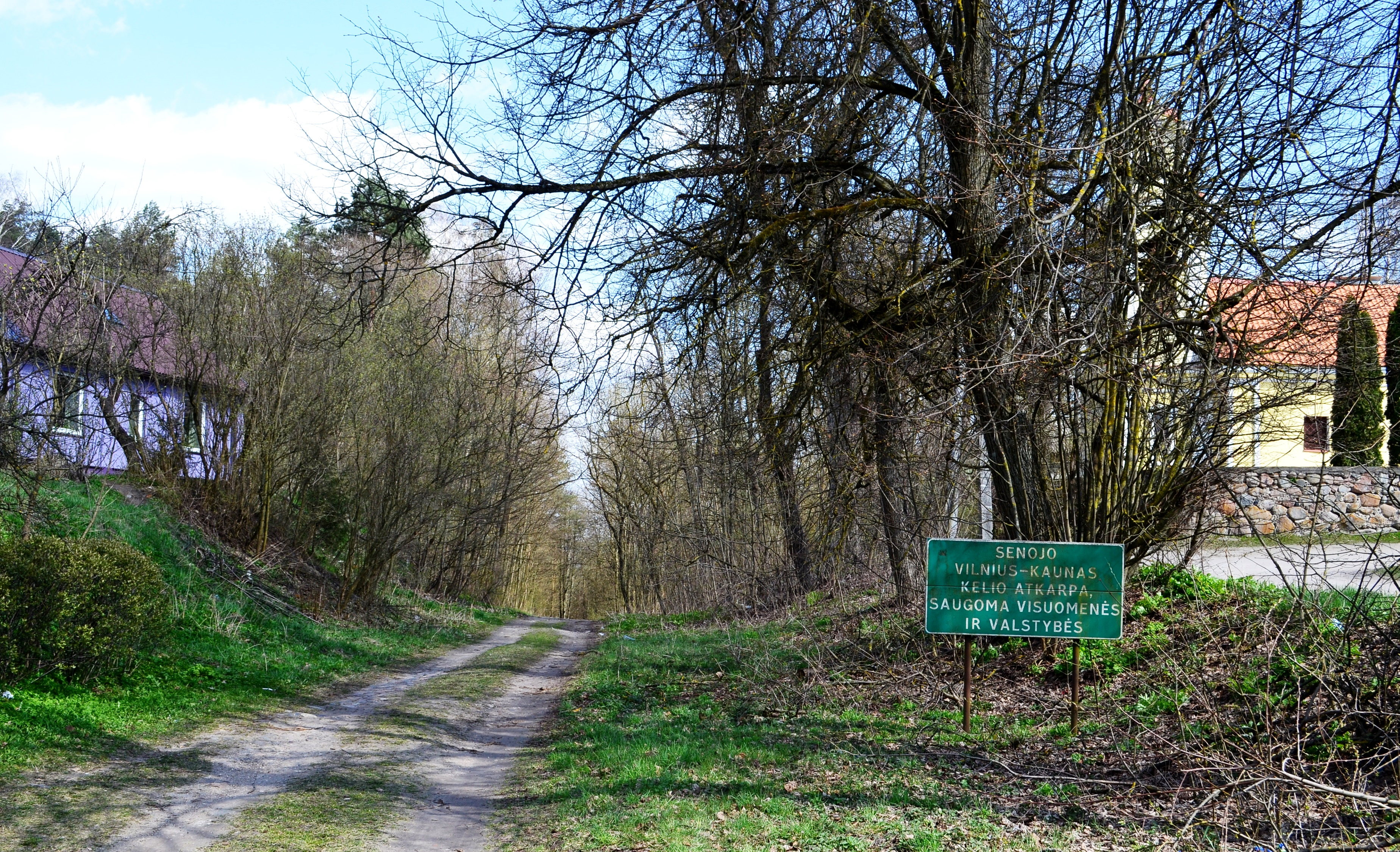 Senojo kelio Vilnius-Kaunas atkarpa, Ž. Paneriai, Vilnius